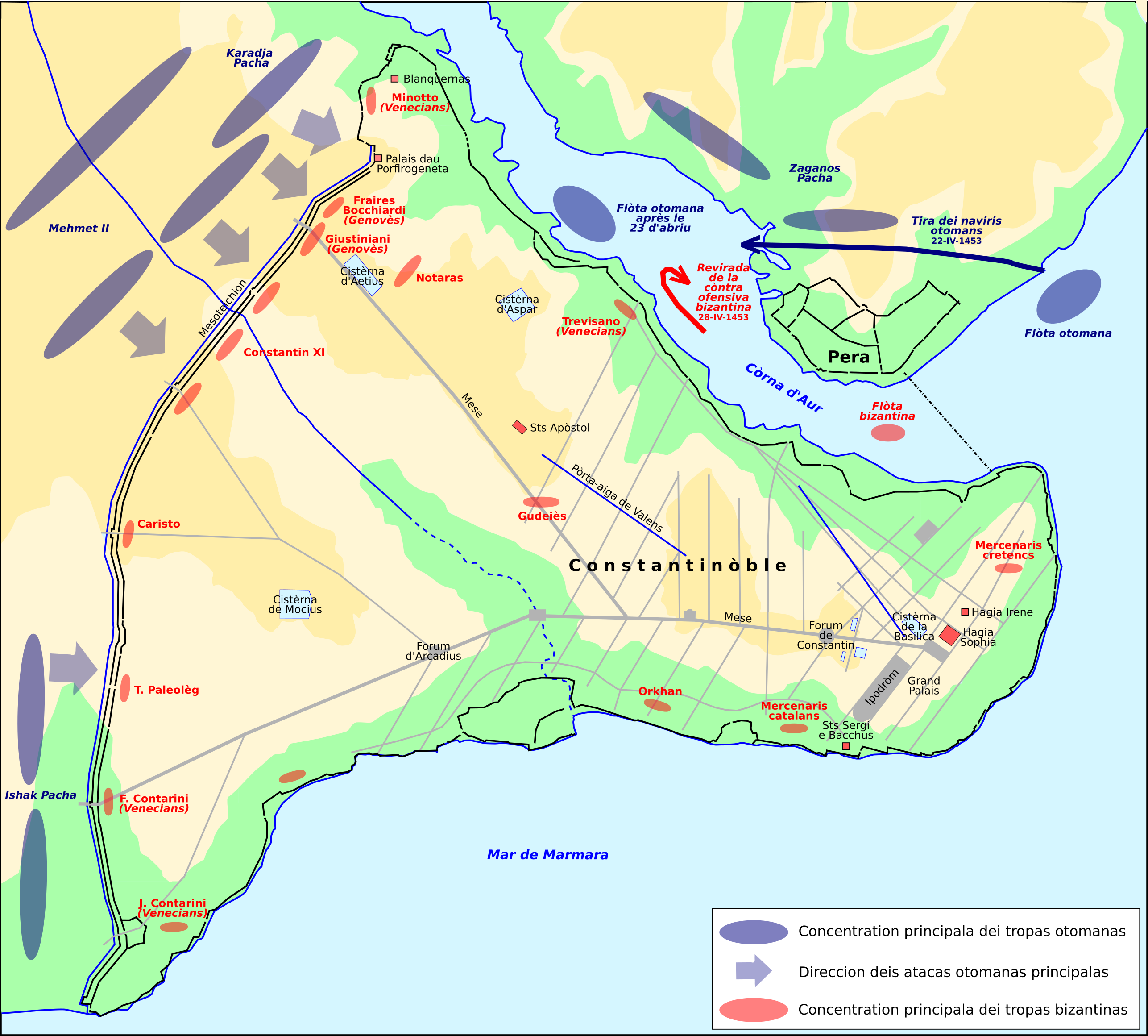 Esquèma simplificat dau sètge de Constantinòble de 1453